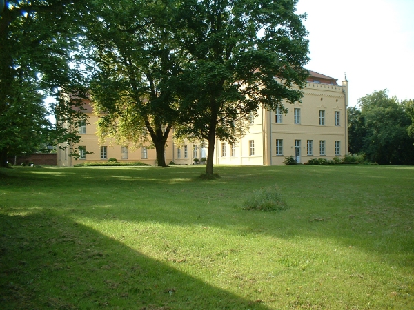 Briest-(Fouqué)-Schloss von Nennhausen, Deutschland.